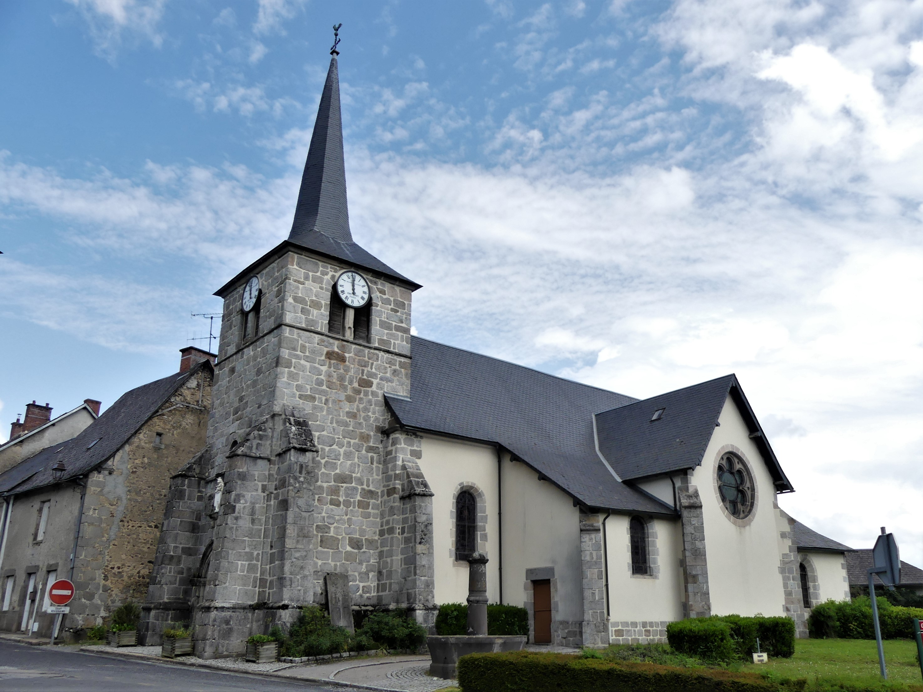 L'église de La Courtine, Creuse, France.